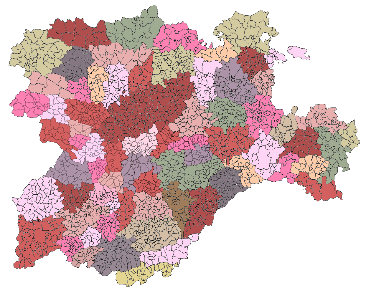 Mapa de las Comarcas de Castilla y León